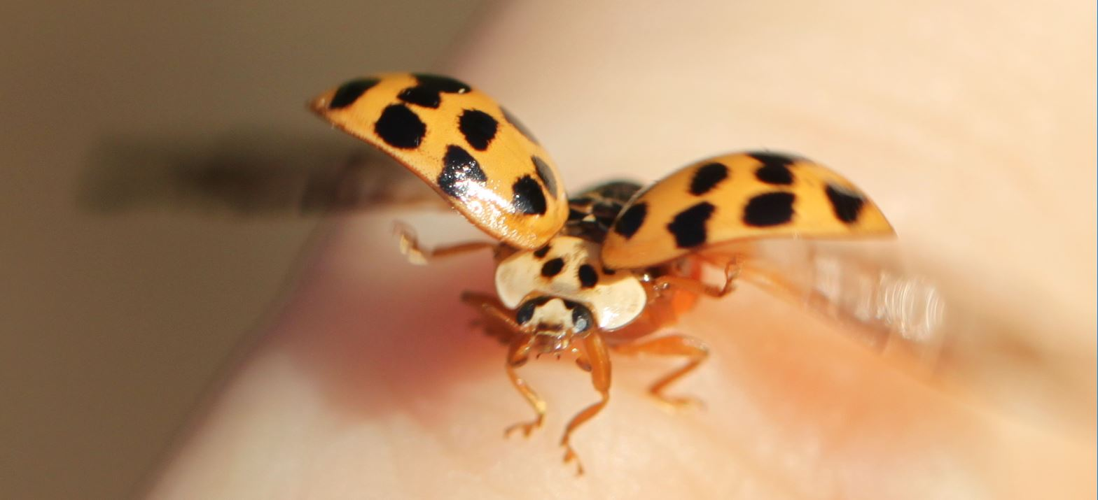 Asiatischer Marienkäfer (Harmonia axyridis) beim Abflug, am 8. Oktober 2018 in der Schwetzinger Hardt